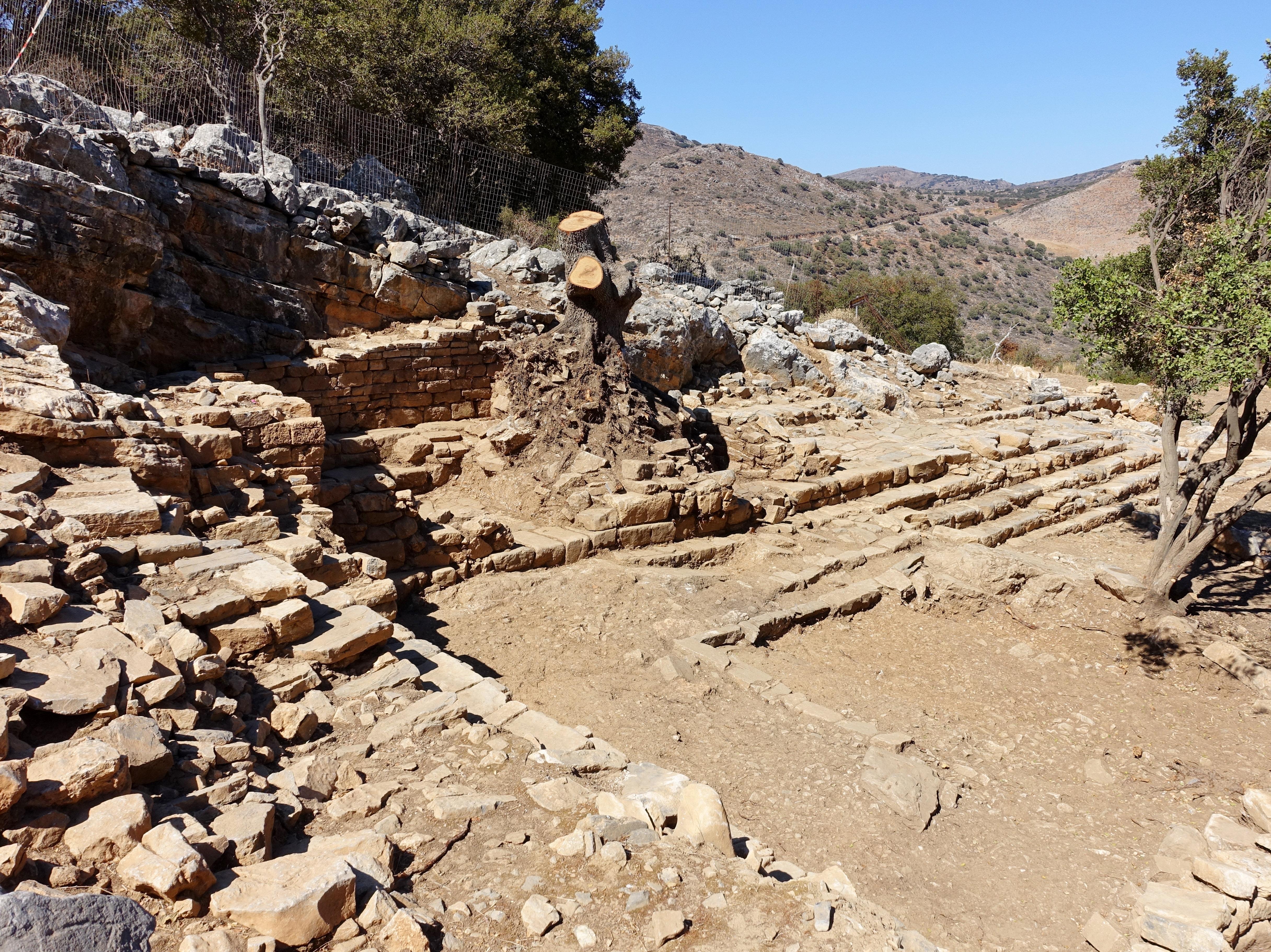 Ausgrabungsstätte von Dreros (Δρῆρος), Gemeinde Agios Nikolaos, Kreta, Griechenland